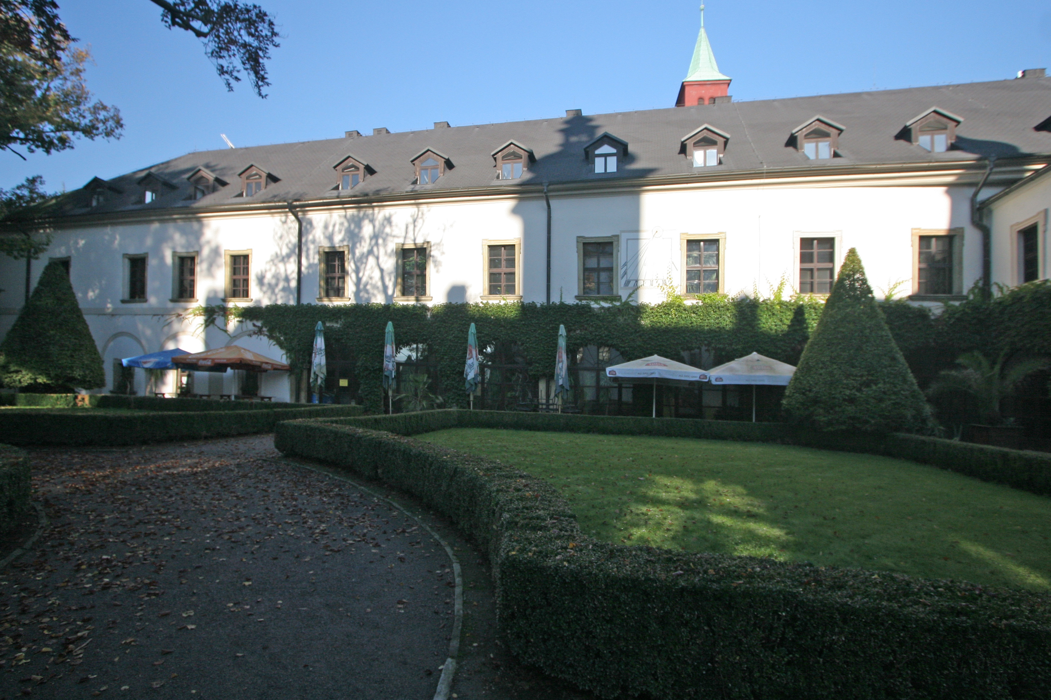 Zámek Letohrad, Václavské nám. 1, Letohrad